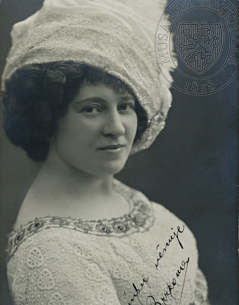 Brzková Terezie, česká herečka